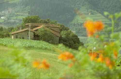 Caseserío Zozola (Sosola)